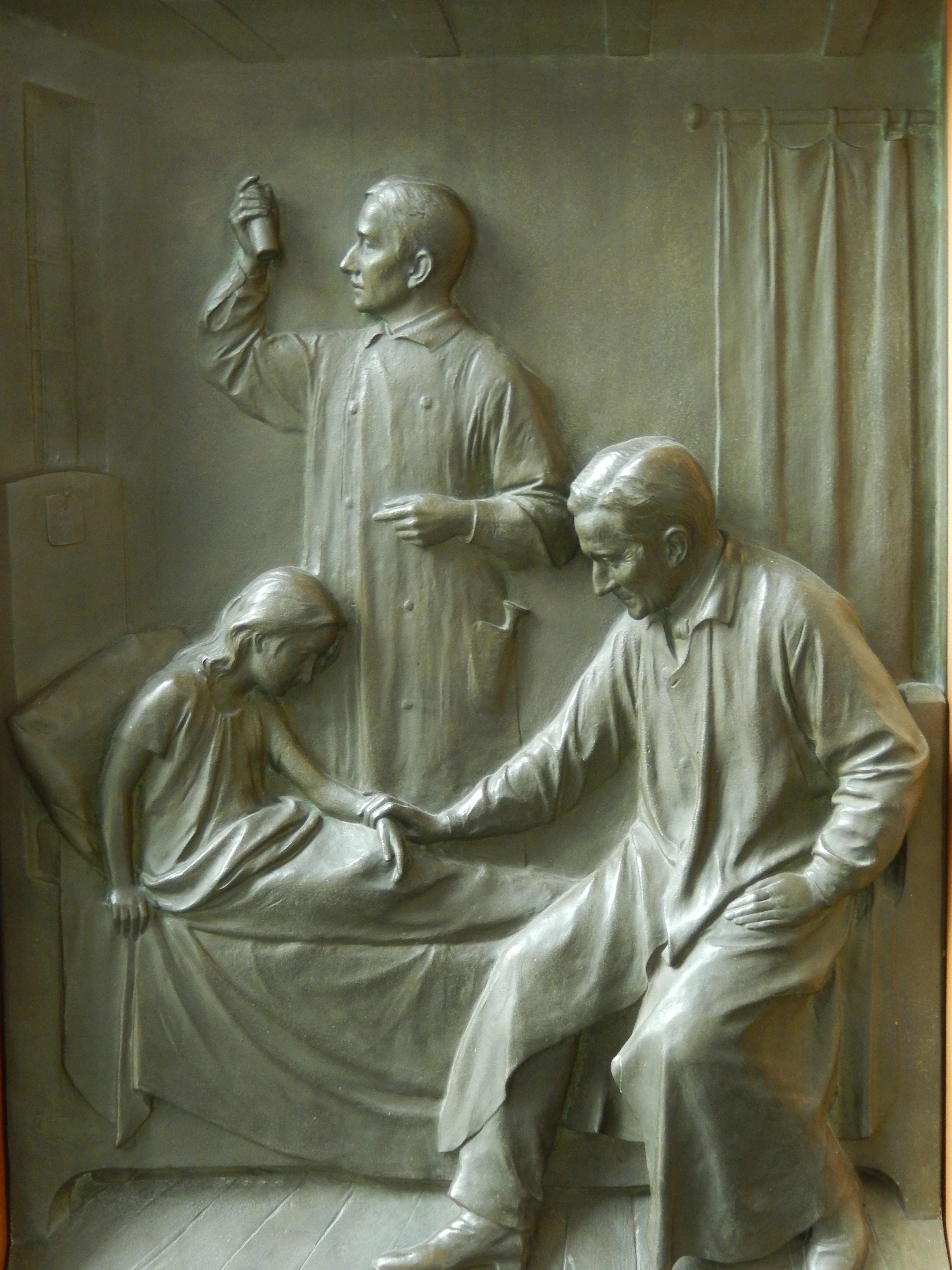 Dresden Univeritätsklinikum: Bronzerelief Zwei Ärzte am Bett eines kranken Mädchen, 1910 vom Dresdner Bildhauer Friedrich Hecht . Darstellend zwei bedeutende Dresdner Kinderärzte, Richard Klemens Förster und sein Sohn Friedrich Richard Förster.